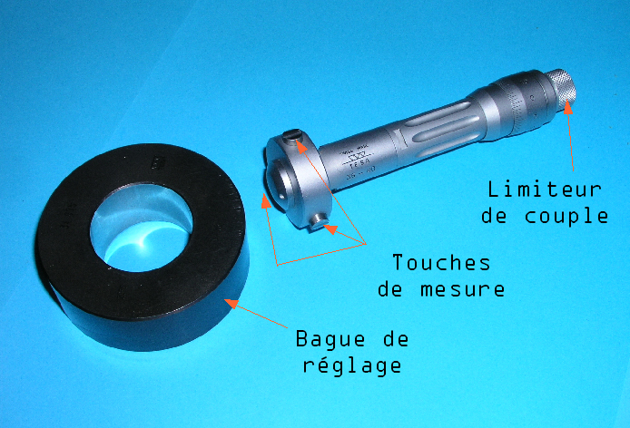 Micromètre d'intérieur trois touches avec sa bague de réglage.